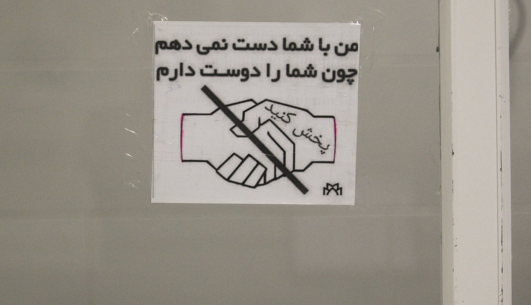 تولید« ژل ضدعفونی کننده » در اصفهان